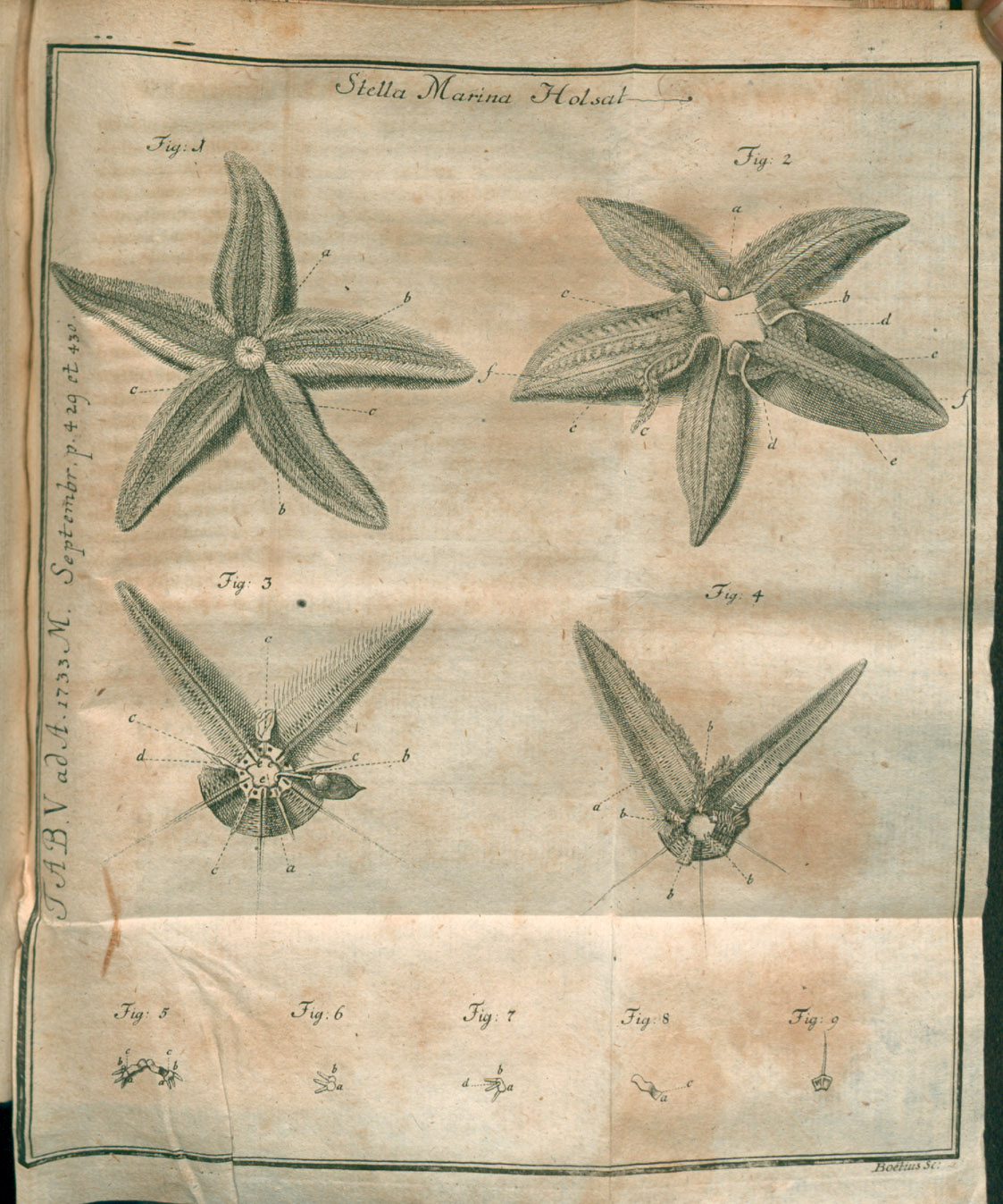 Illustration